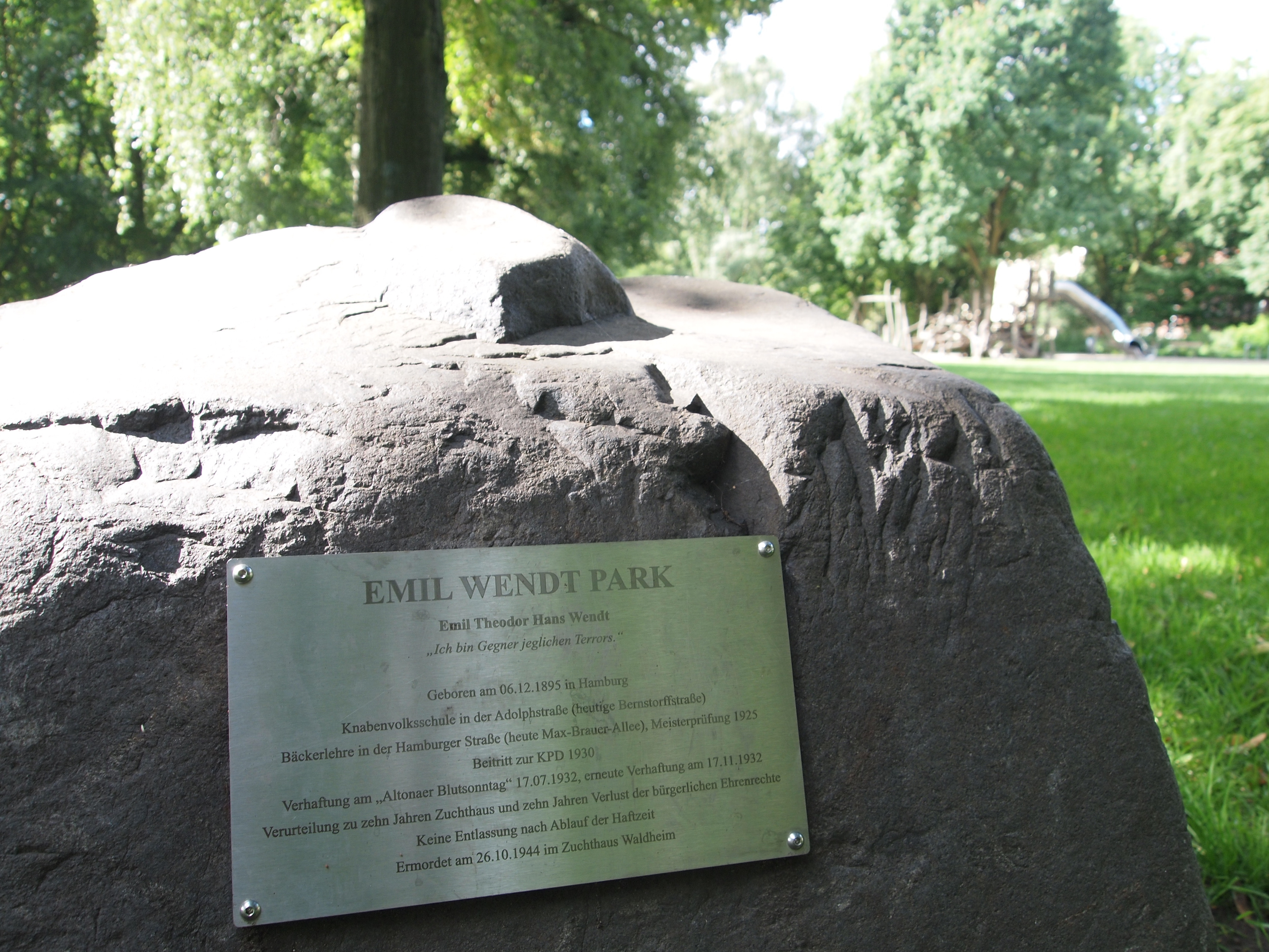 Gedenkstein für Emil Wendt im ehemaligen Gählerpark, jetzt Emil-Wendt-Park, Grünzug Hamburg Altona